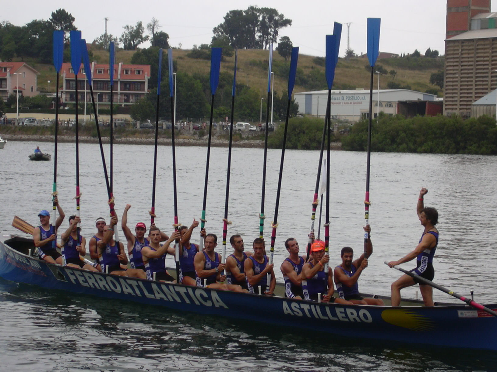 Astillero ganador de la Bandera de Astillero 2005.